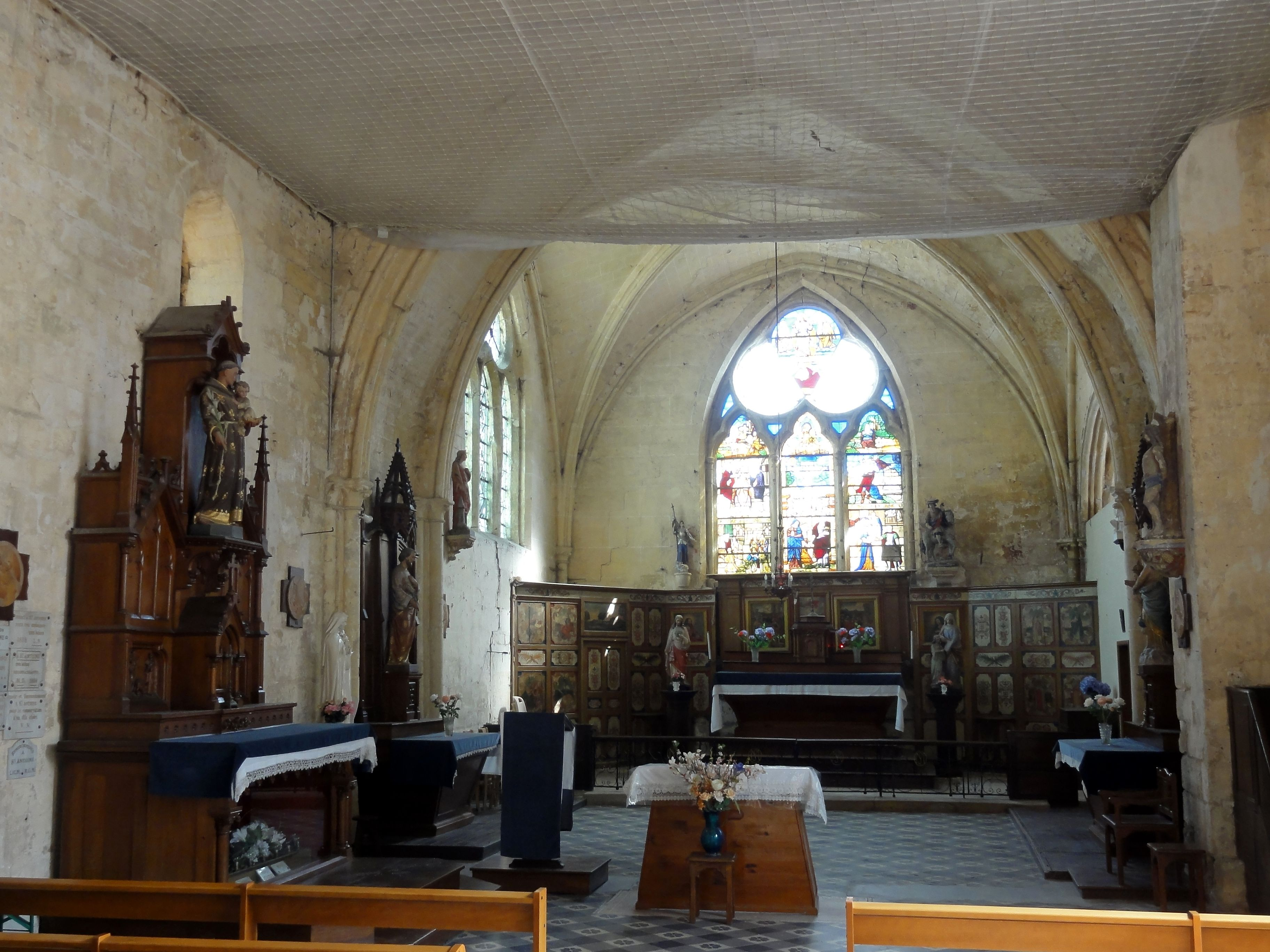 Chœur.